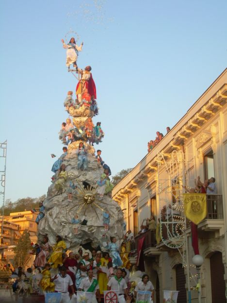 Palmi, manifestazione della Varia di Palmi